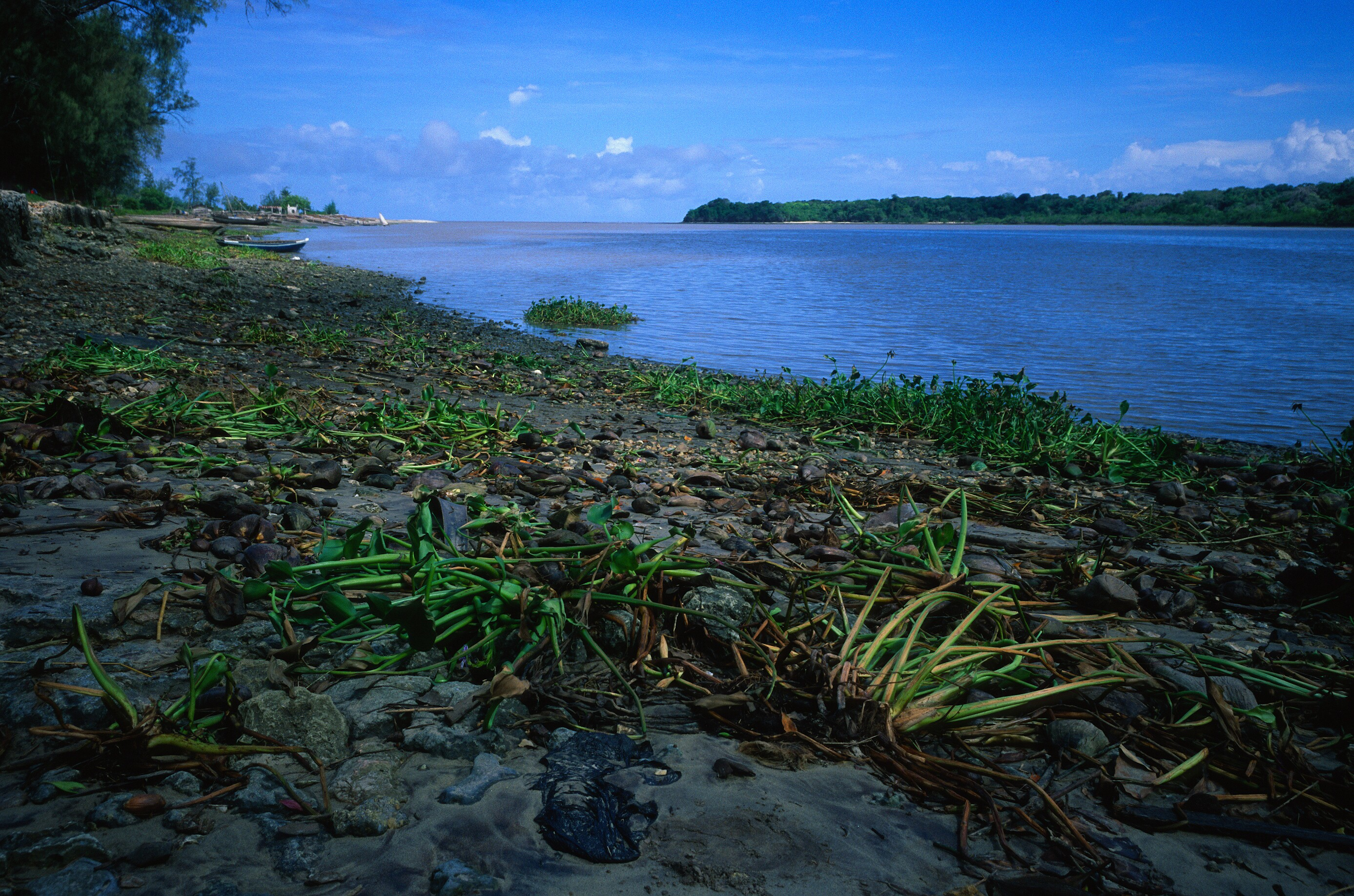 Pangani